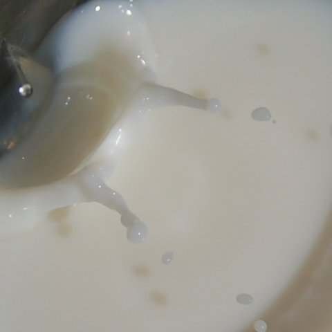 Milk